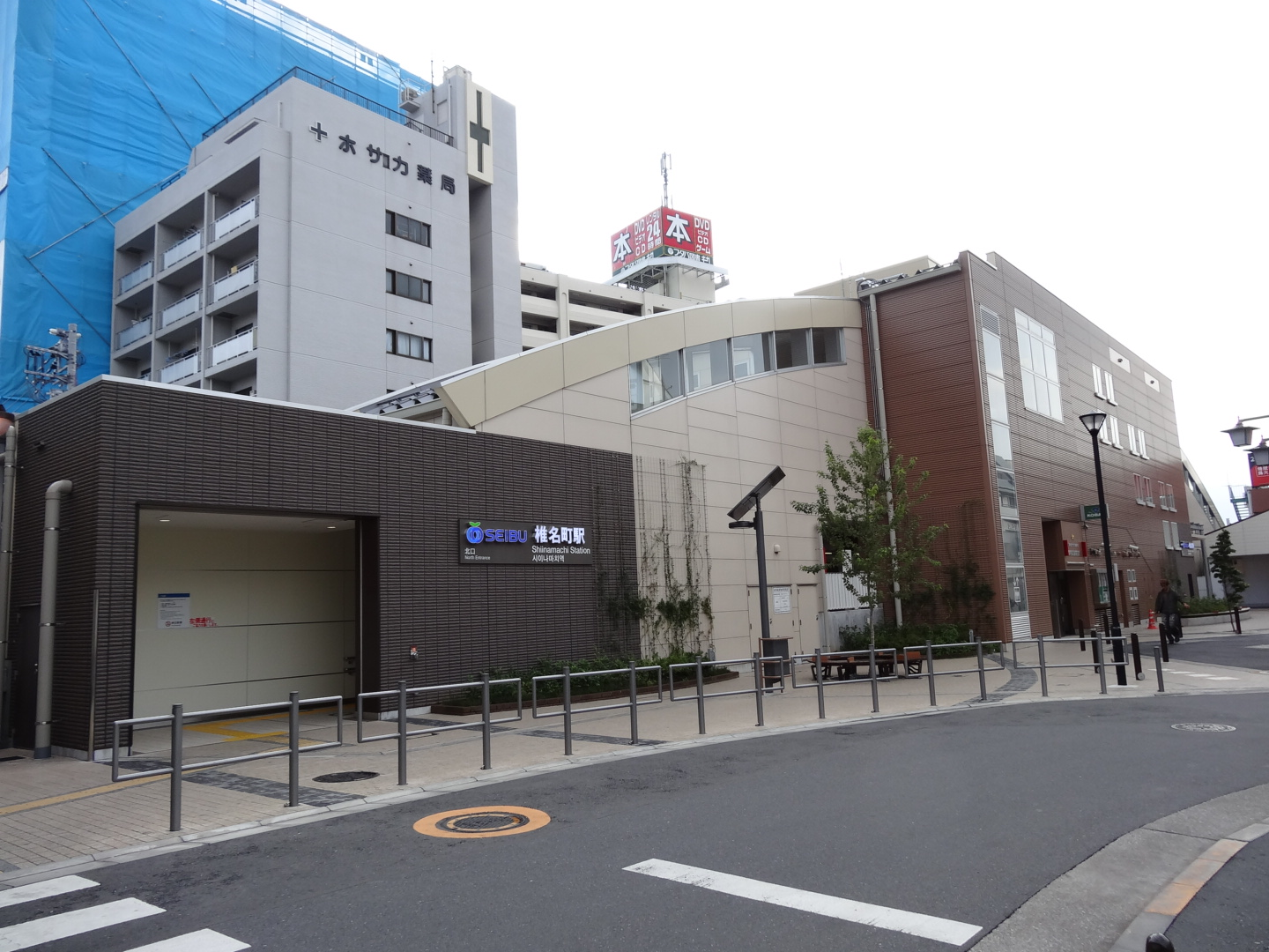 椎名町駅北口（2013/11/05撮影）